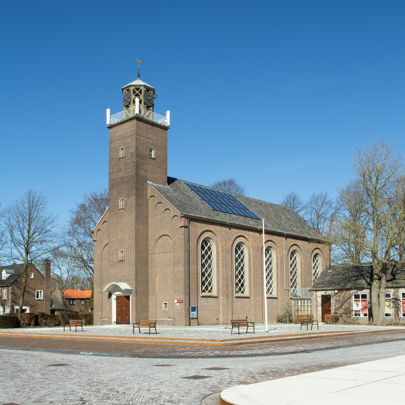 Schoondijke General Cemetery